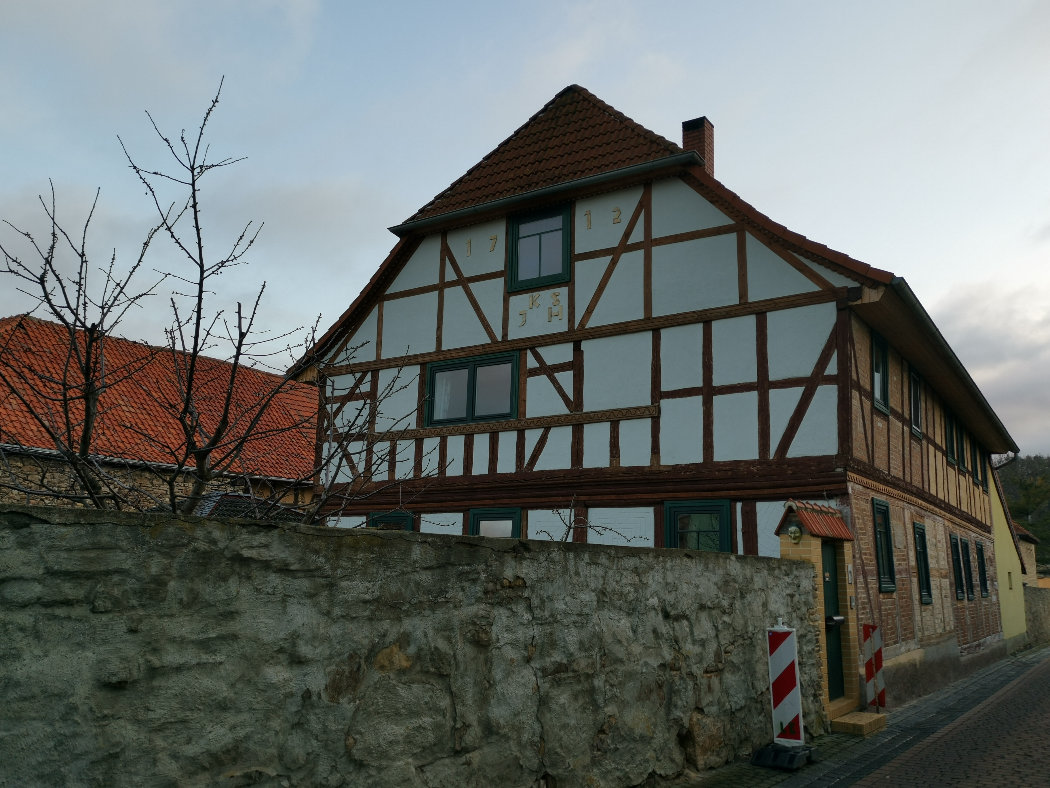 Denkmalgeschütztes Wohnhaus in der Schenkengasse 1 in Timmenrode